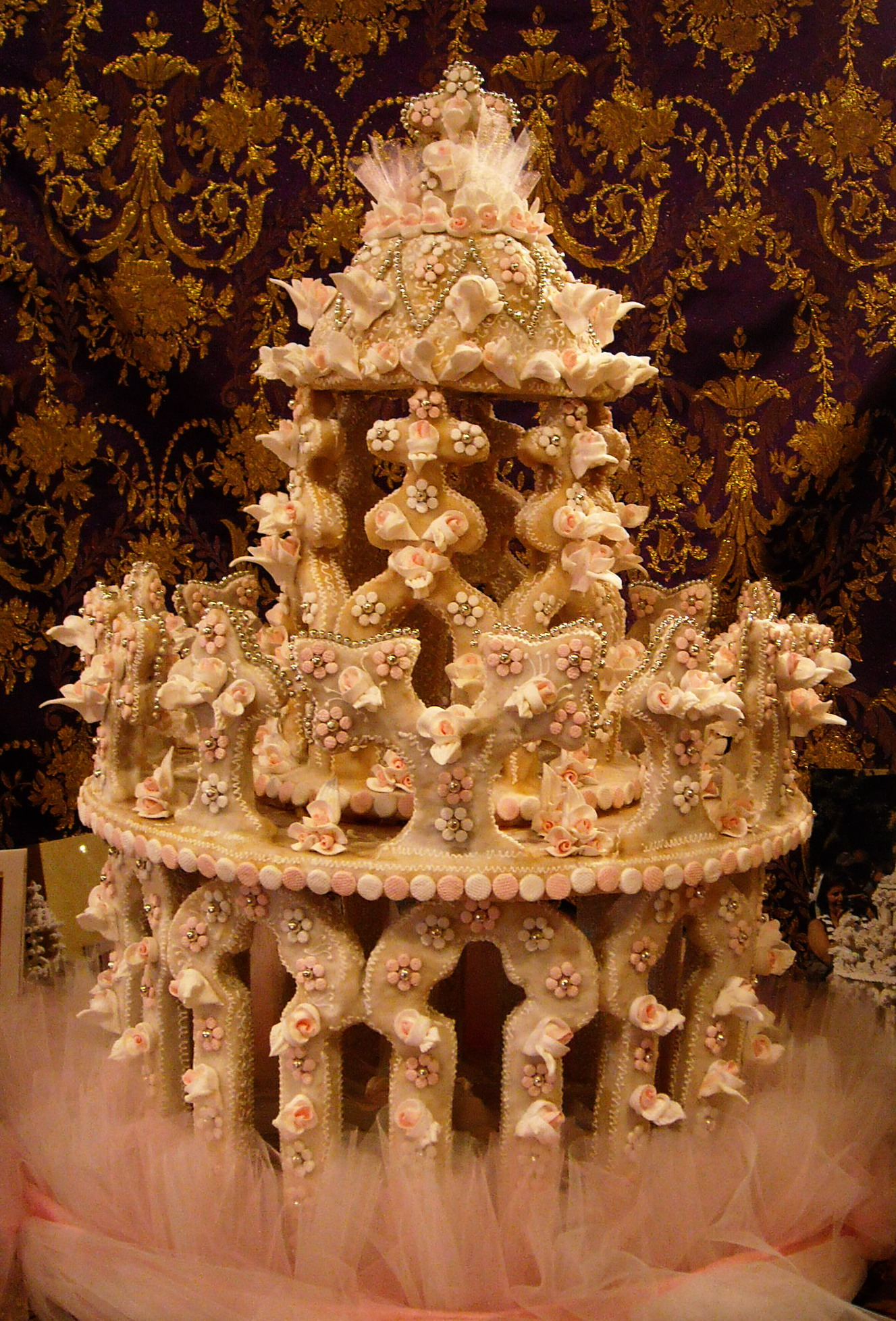 Torta di Pistoccus Mostra di pani e dolci tradizionali della Sardegna - Casa Angioni, Quartucciu (Cagliari).